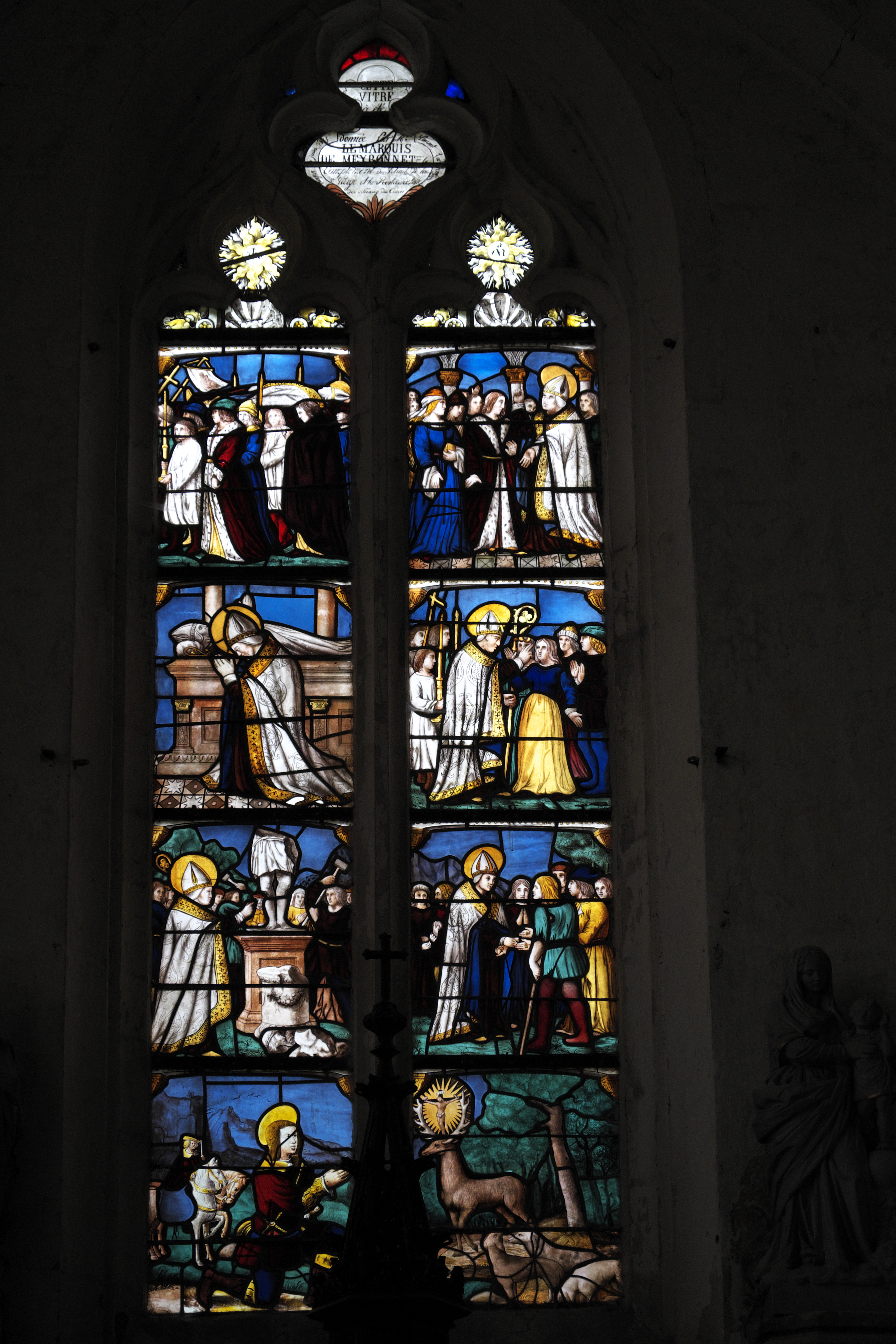 Katholische Kirche Notre-Dame-en-sa-Nativité in Puellemontier im Département Haute-Marne (Champagne-Ardenne/Frankreich), Bleiglasfenster mit Fragmenten aus dem ersten Viertel des 16. Jahrhunderts; Darstellung: Legende des hl. Hubertus .